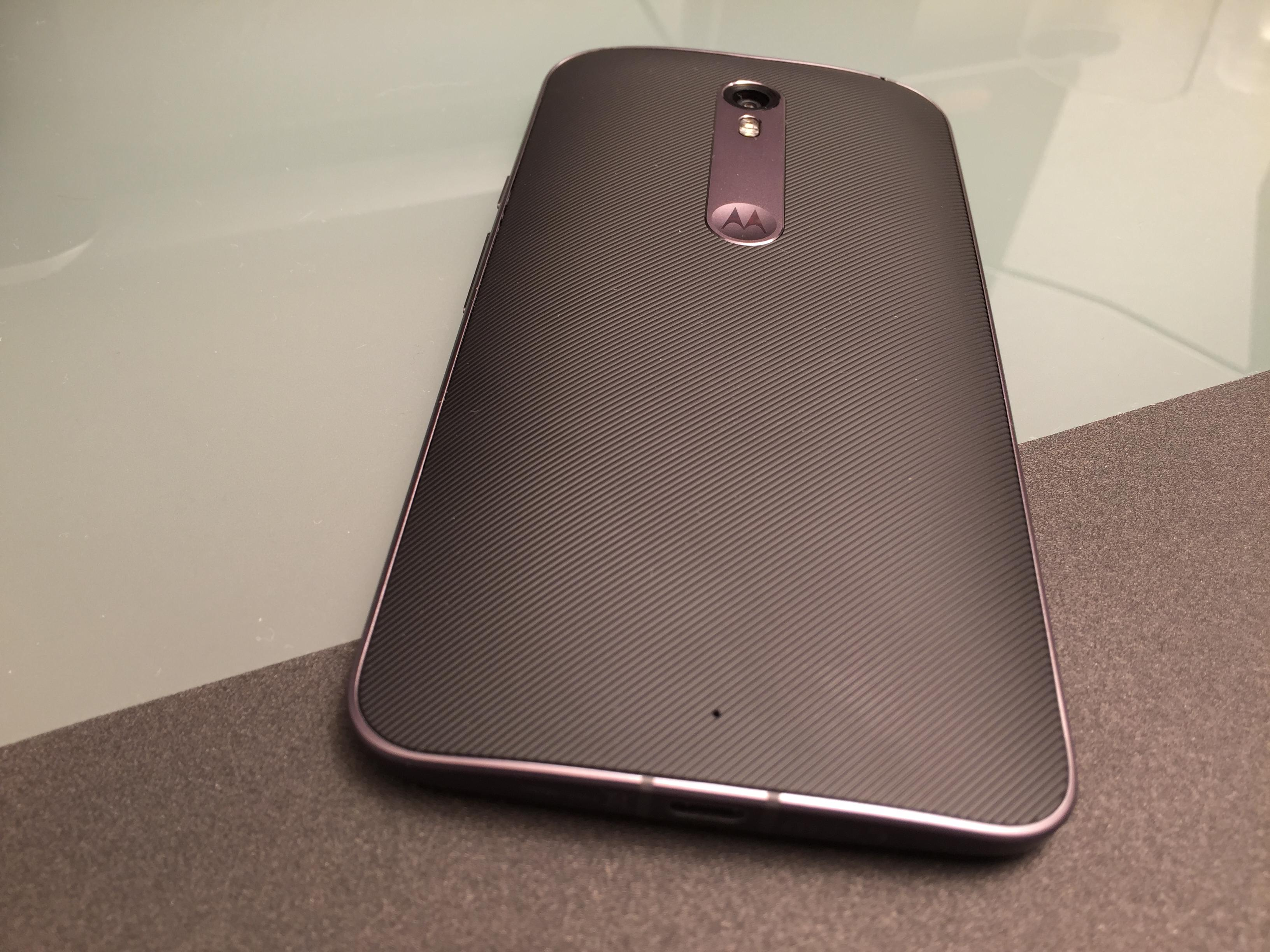 Moto X Style